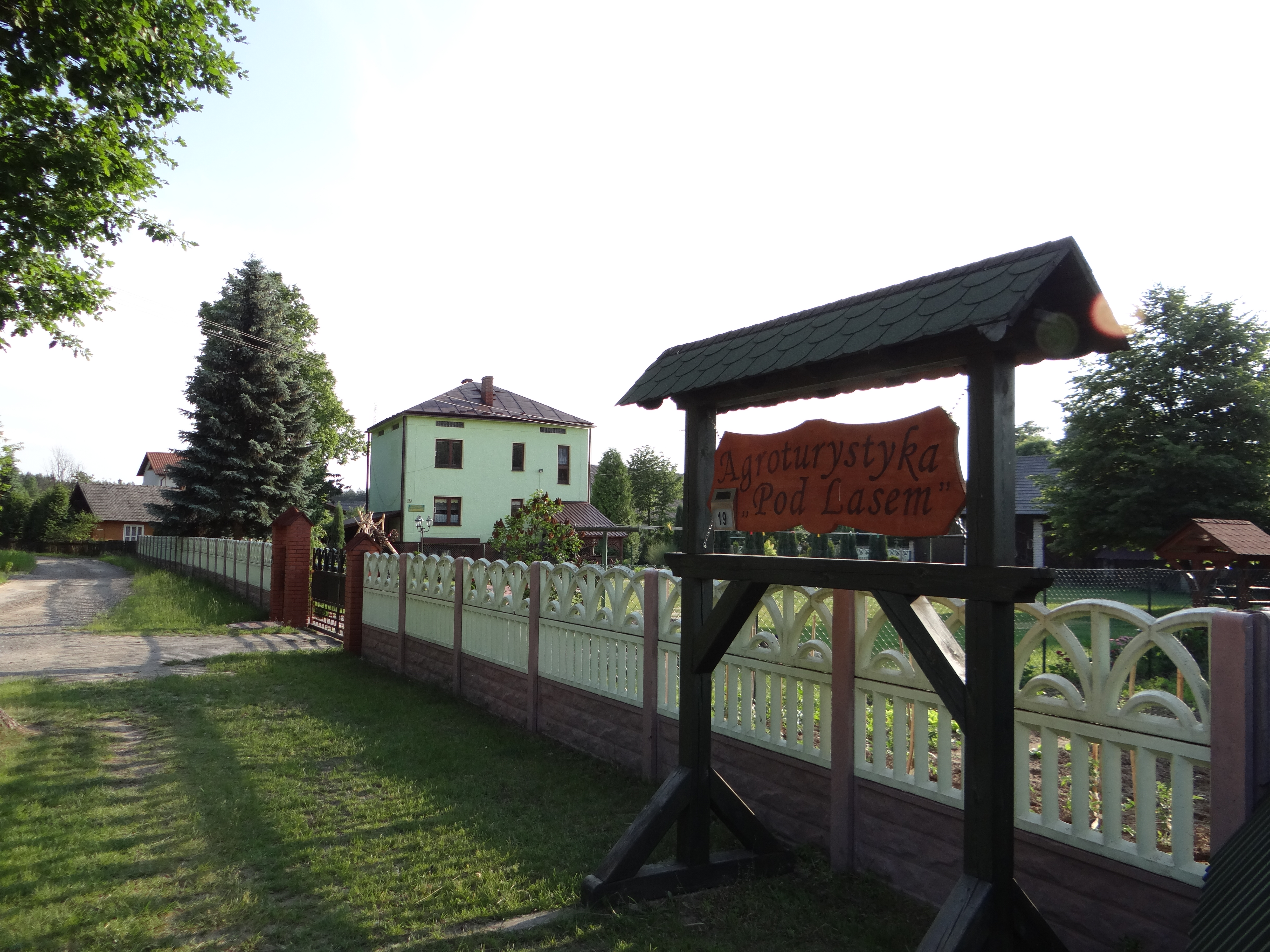 Zdjęcie wykonane w miejscowości Szwedy, powiat niżański.